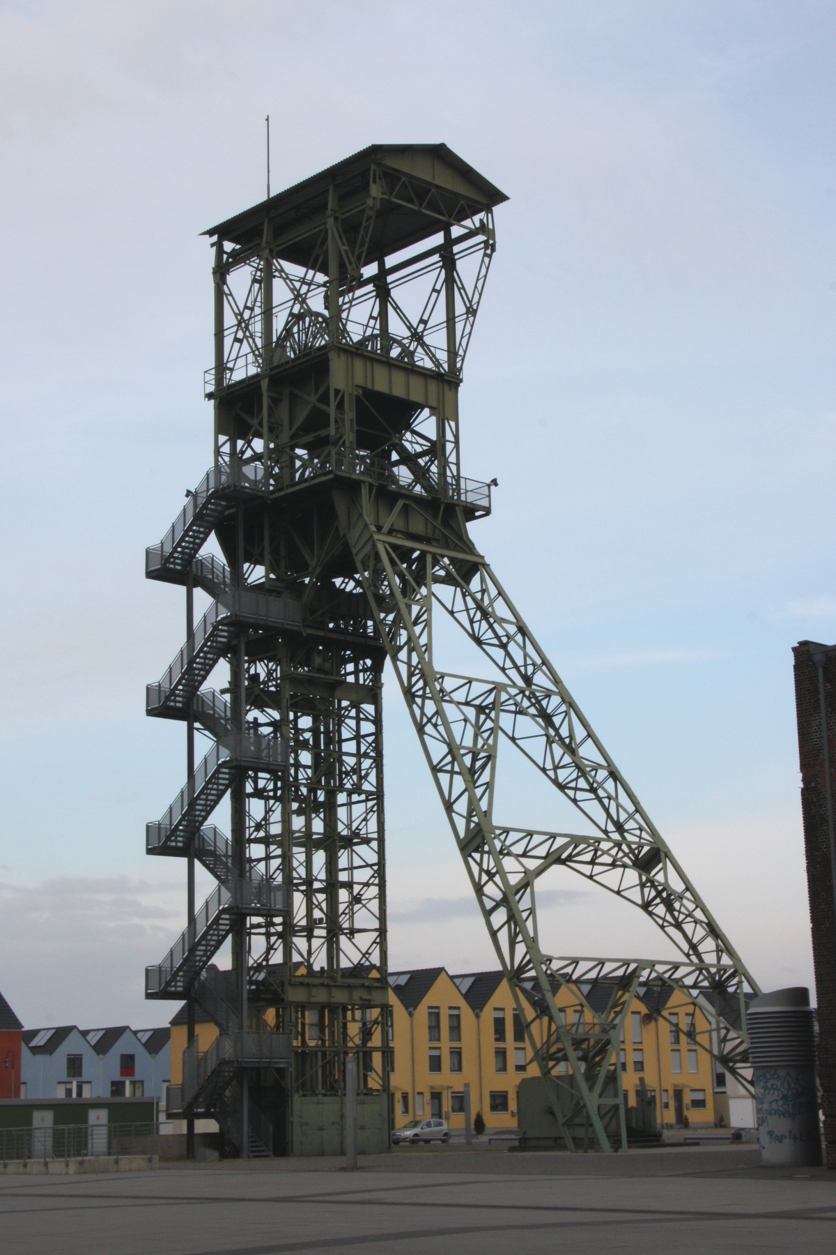 Baudenkmal Alsdorf, Fördergerüst Hauptschacht